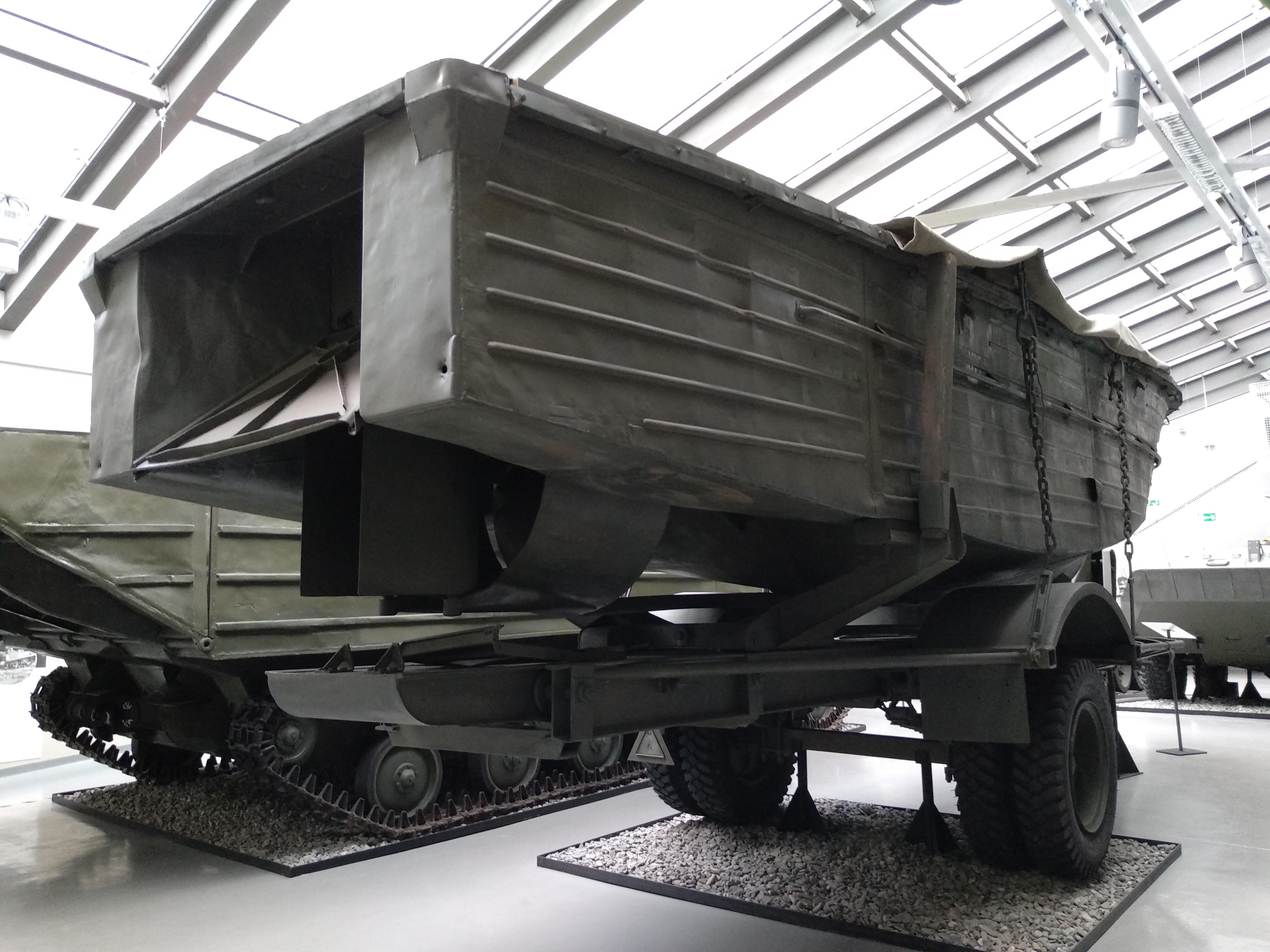 Rzeczny kuter holowniczy typu BMK-90 eksponowany w Muzeum Fortyfikacji i Broni "Arsenał" w Zamościu.